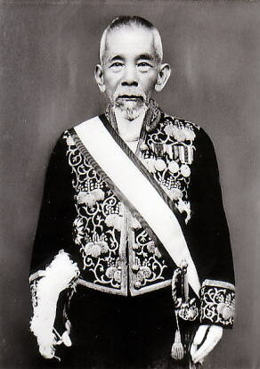 犬養毅(Inukai Tsuyoshi,1855-1932)